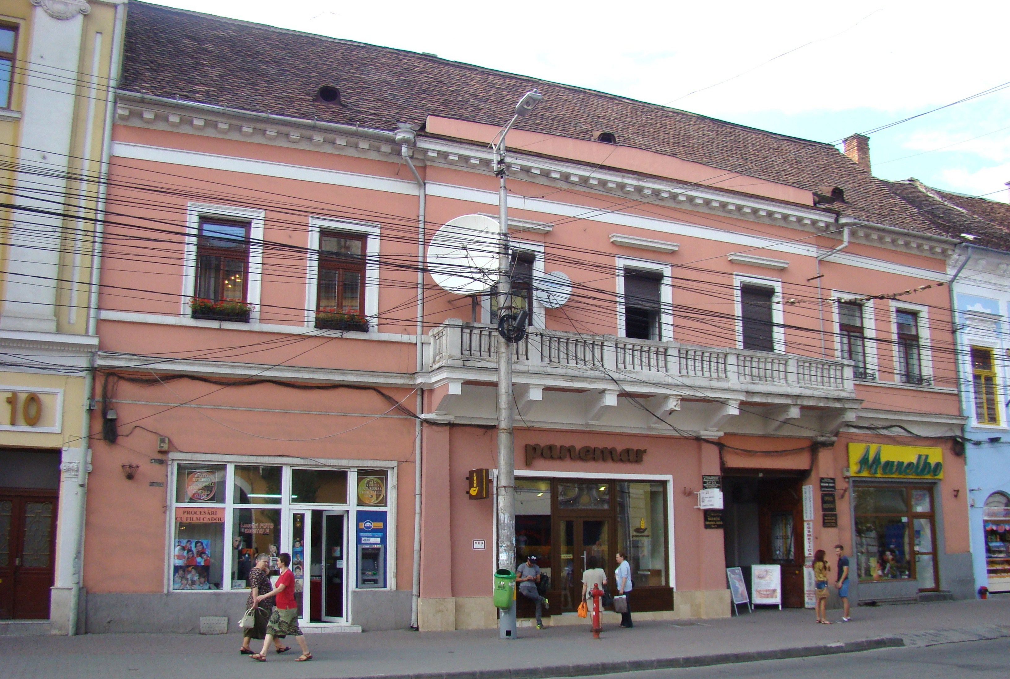 Casă monument istoric, str.Memorandumului, nr.8